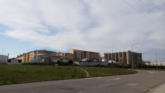 Beriáin, Navarra